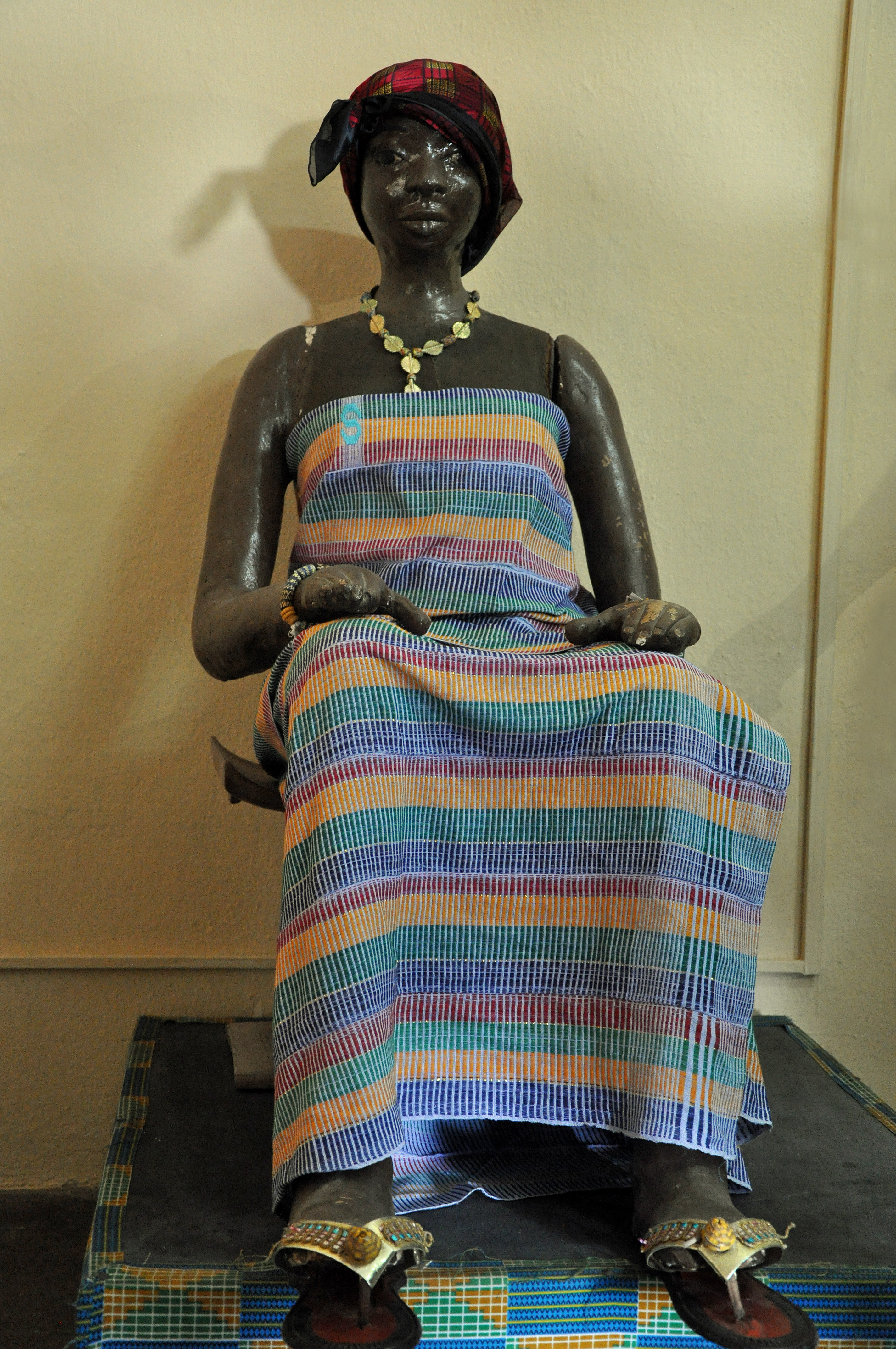 Reine Mère Akan This is an image of Cultural Fashion or Adornment from Ivory Coast